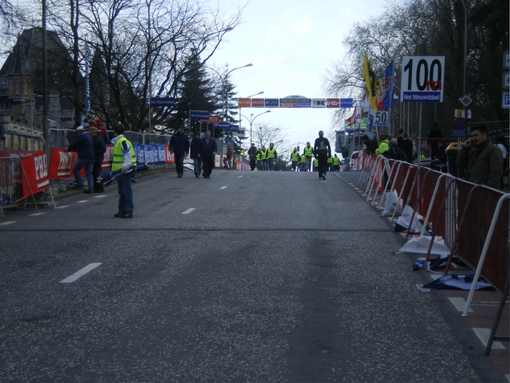 Arrivée du Omloop Het Volk à Gand - Aankomst van Omloop Het Volk in Gent